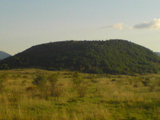 Вигляд гори Капуна (з боку садів села Руське Поле)